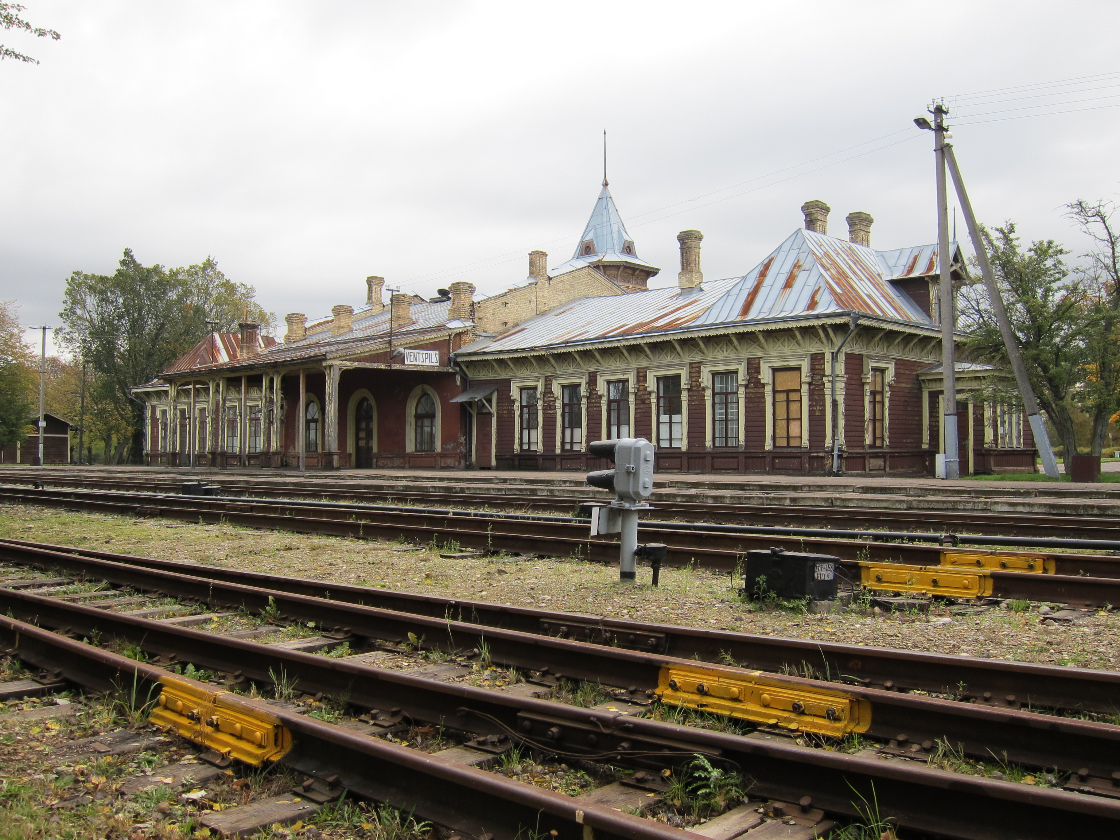 Ventspils stacija